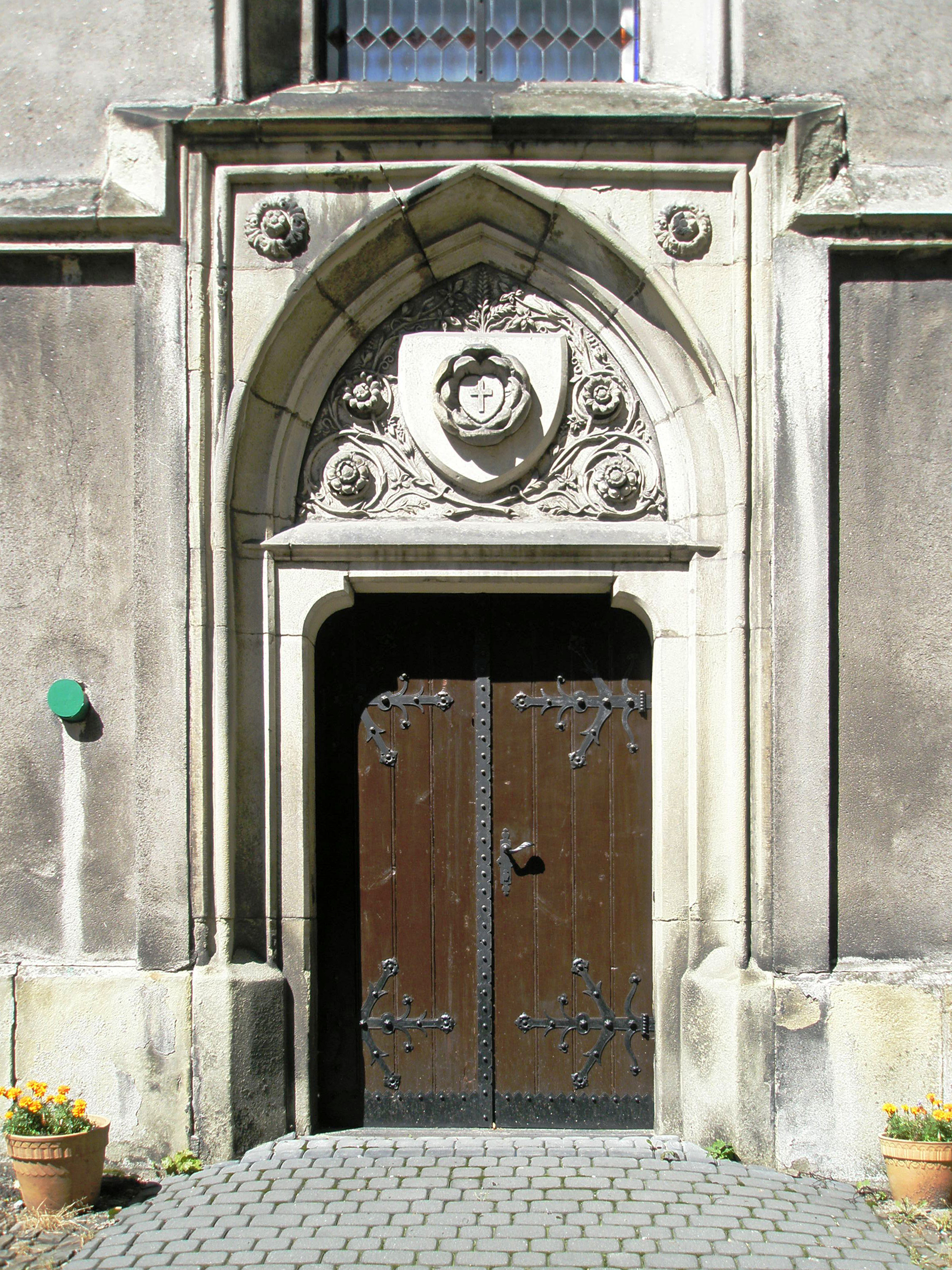 Portal boczengo wejścia katedry ewangelickiej pw. Zbawiciela w Bielsku-Białej